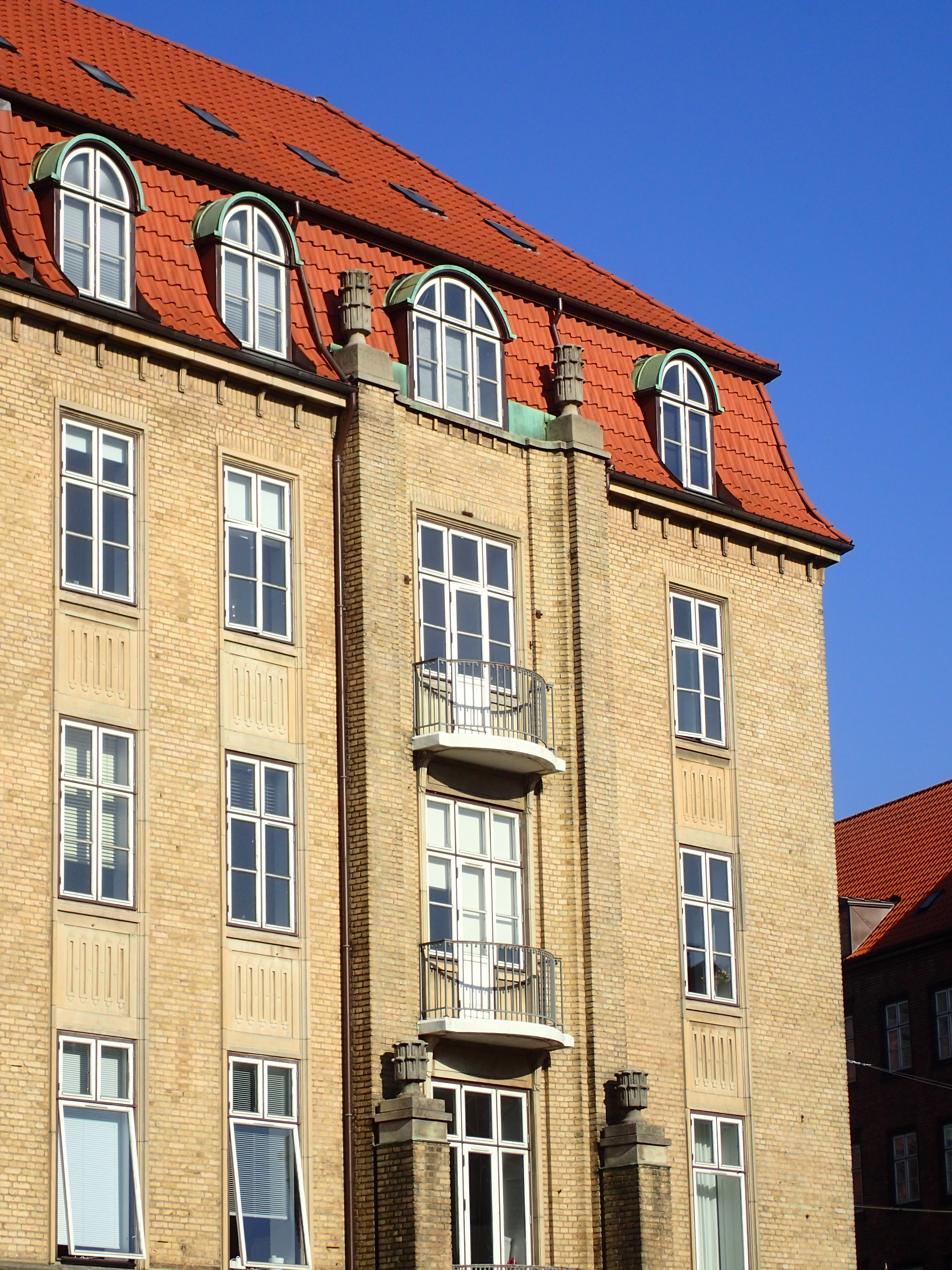 Banegårdspladsen 6, facade detaljer.